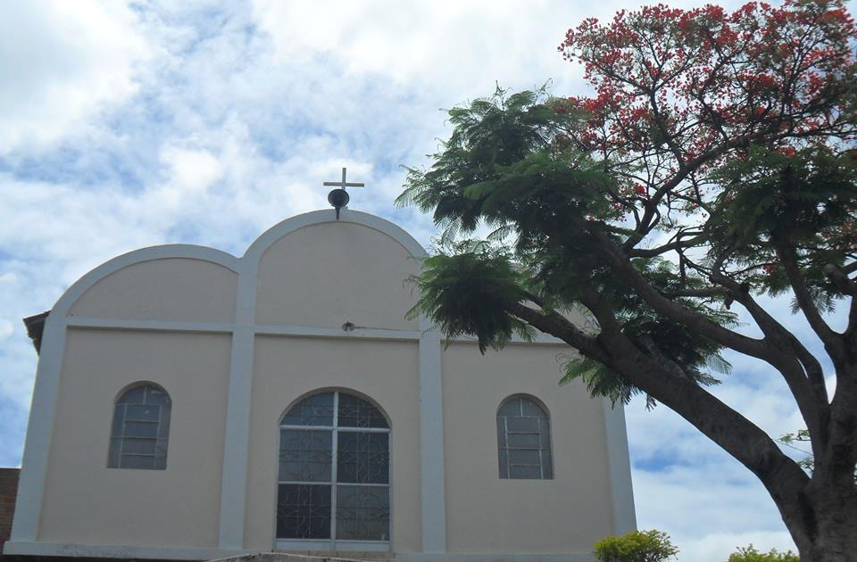 Igreja Bom Jesus - Água Branca de Minas